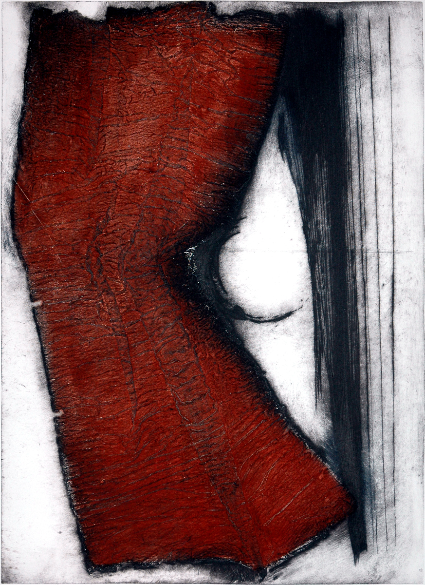 Romana Rotterová, VSTUP, kombinovaná technika,60x43 cm (1987)